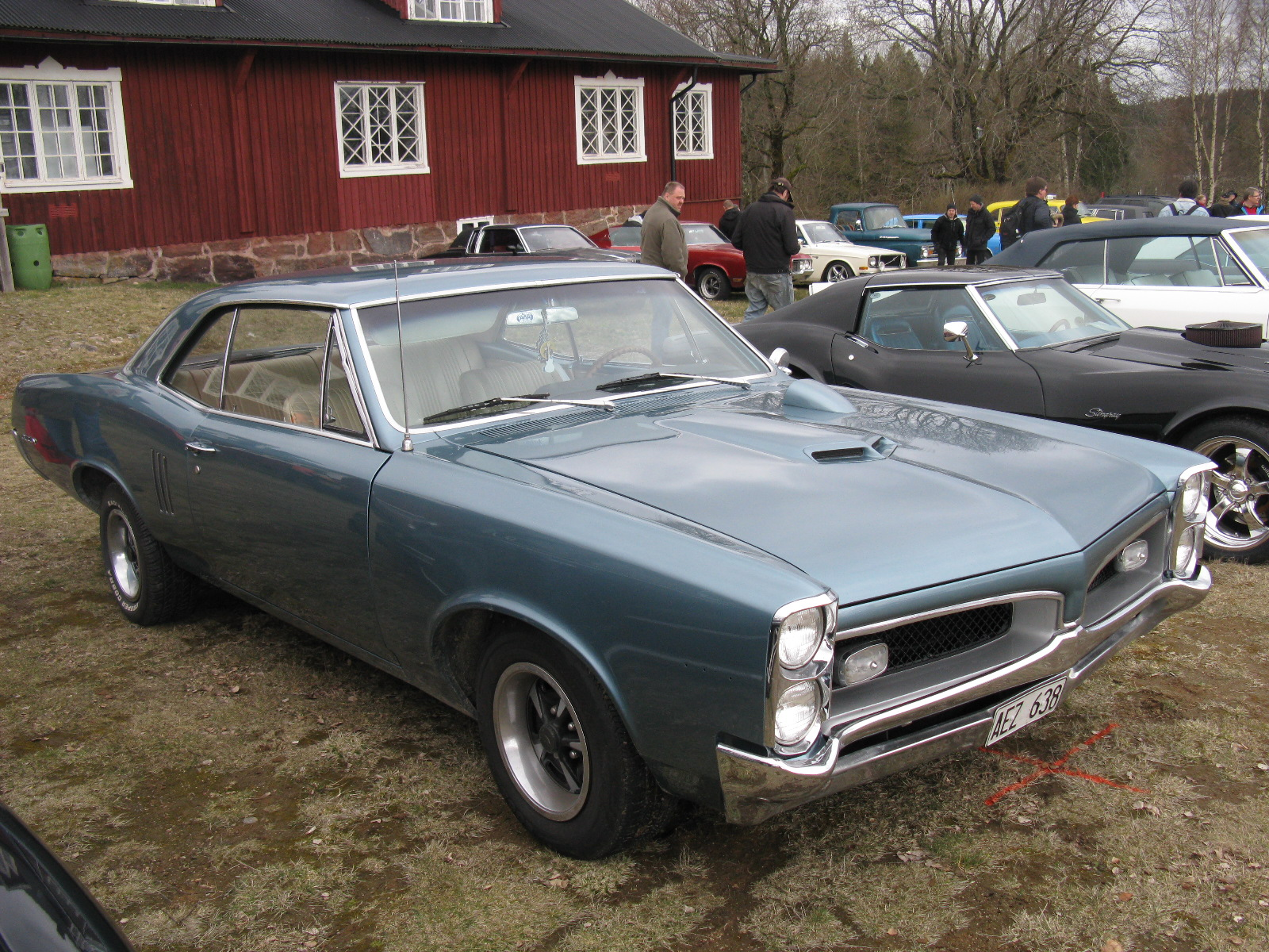 Pontiac GTO